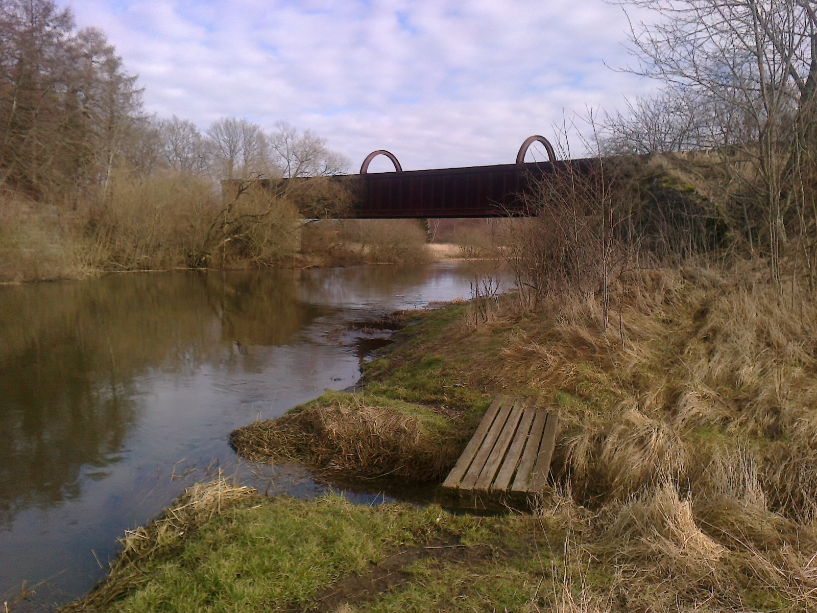 Kassebroen, den ældste bro over Gudenåen ved Langå